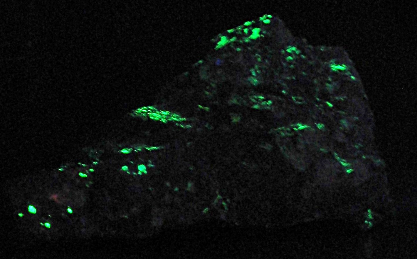 Uranerz vom Krunkelbach in Menzenschwand ausgestellt im Museum St. Blasien, beleuchtet mit UV-Licht